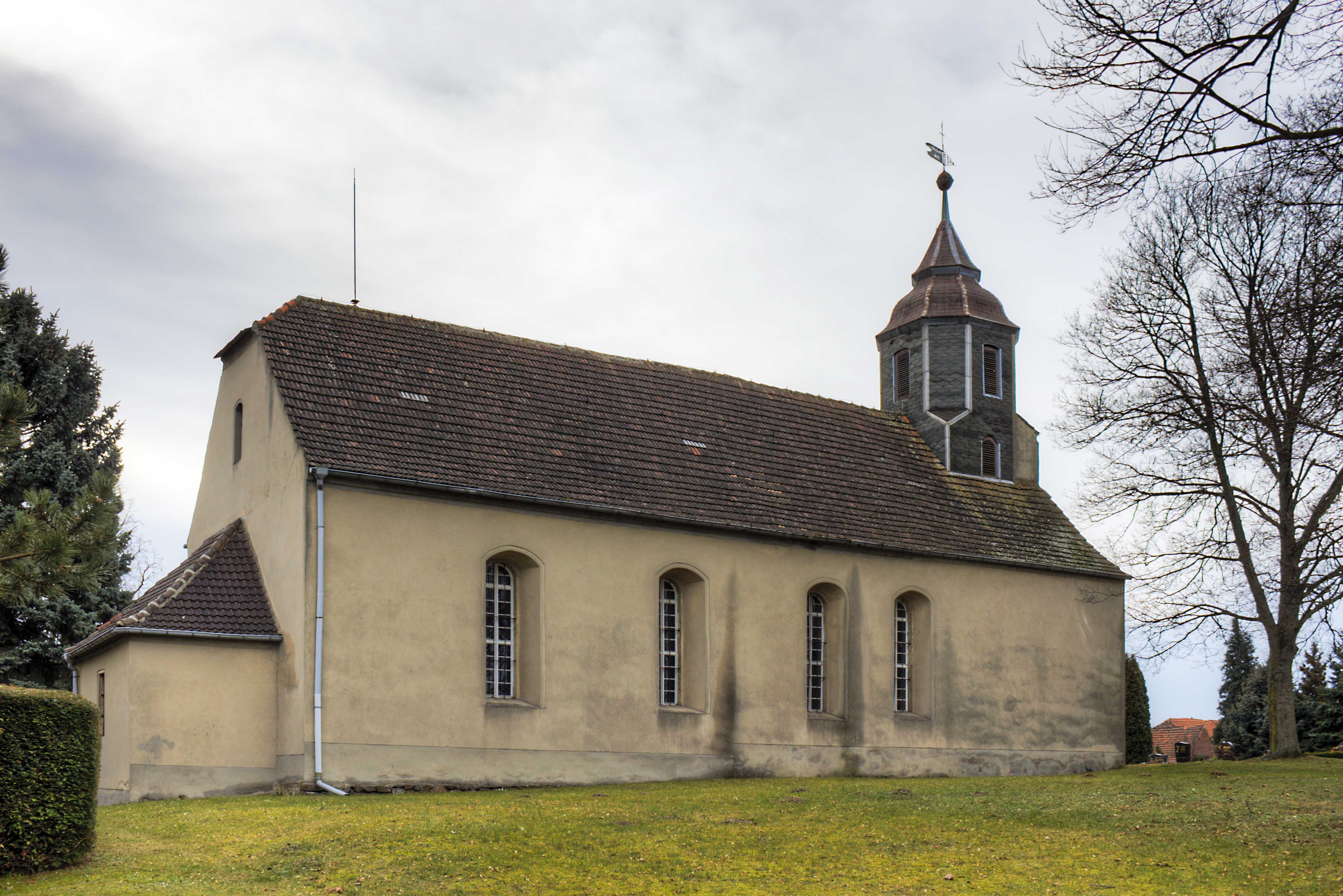 Kirche Neußen